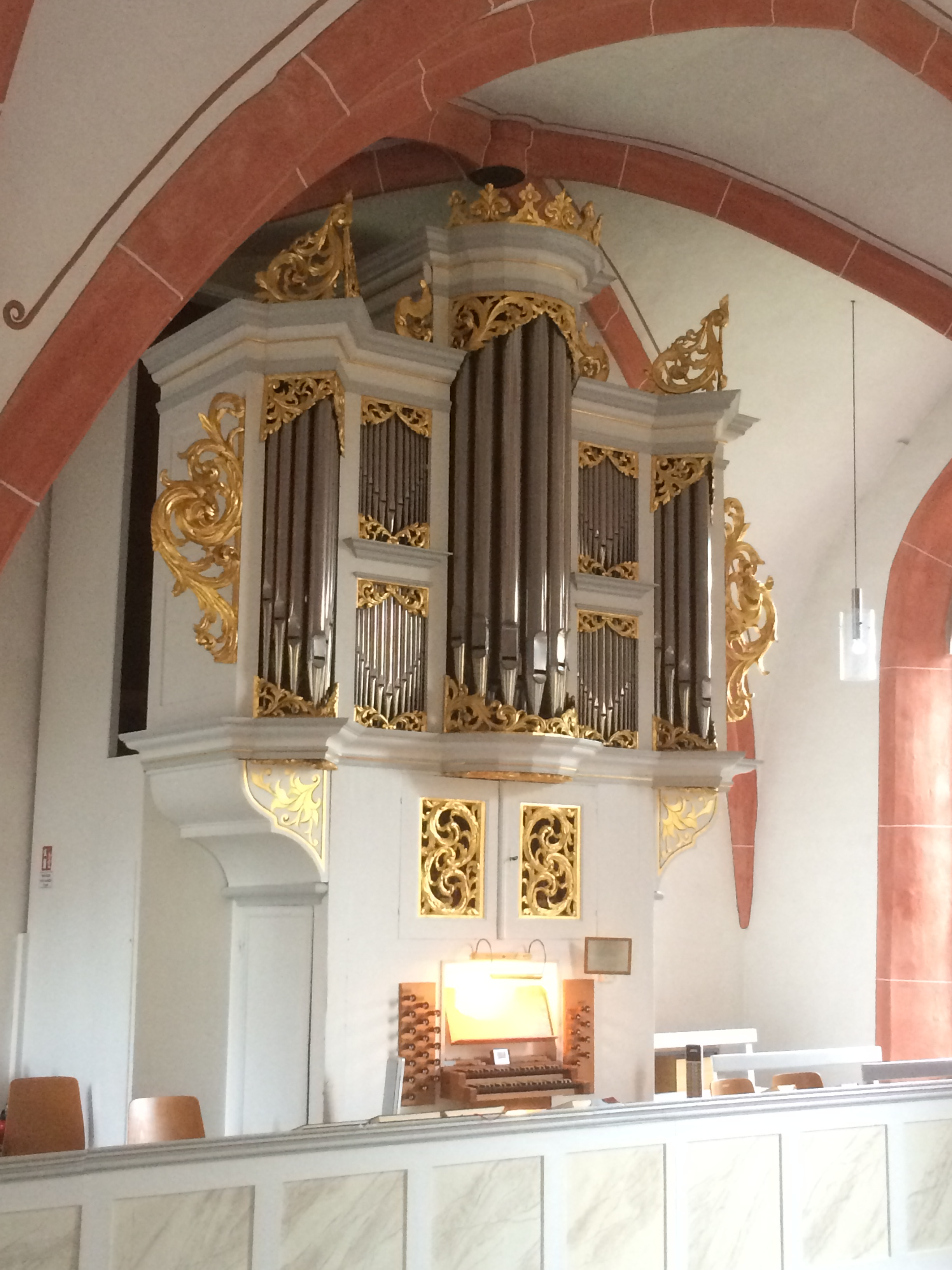 Orgel der Stadtkirche Sontra mit Gehäuse von Johann Adam Gundermann 1710/1711